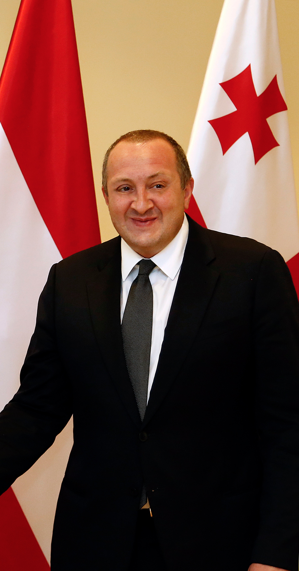 Arbeitsbesuch Georgien. Bundesminister Sebastian Kurz trifft den georgischen Präsidenten Giorgi Margvelashvili. 10.09.2014. Foto: Dragan Tatic